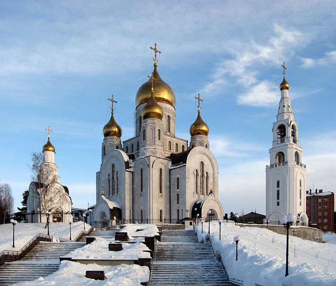 Храм Воскресения Христова в Ханты-Мансийске